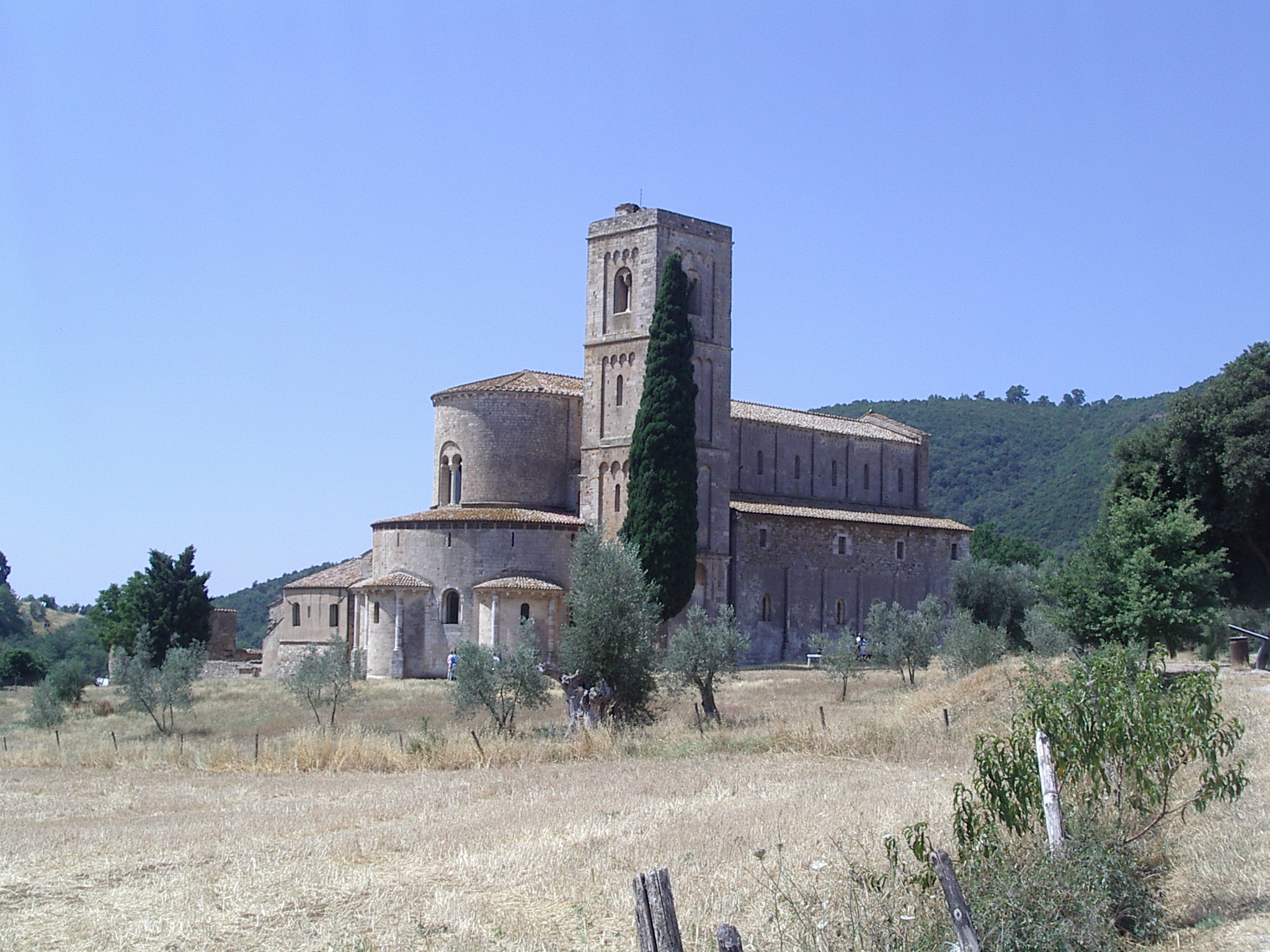 Abbazia di Sant'Antimo